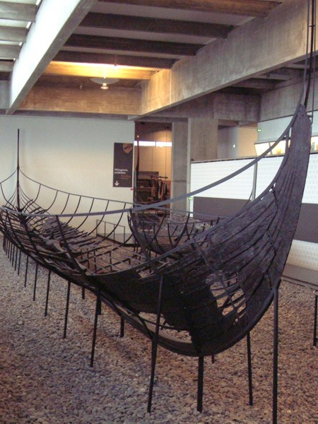 Skuldelev II: Ein wikingerzeitlichees Kriegsschiff, das im Roskilde-Fjord in der Nähe von Skuldelev gefunden wurde.